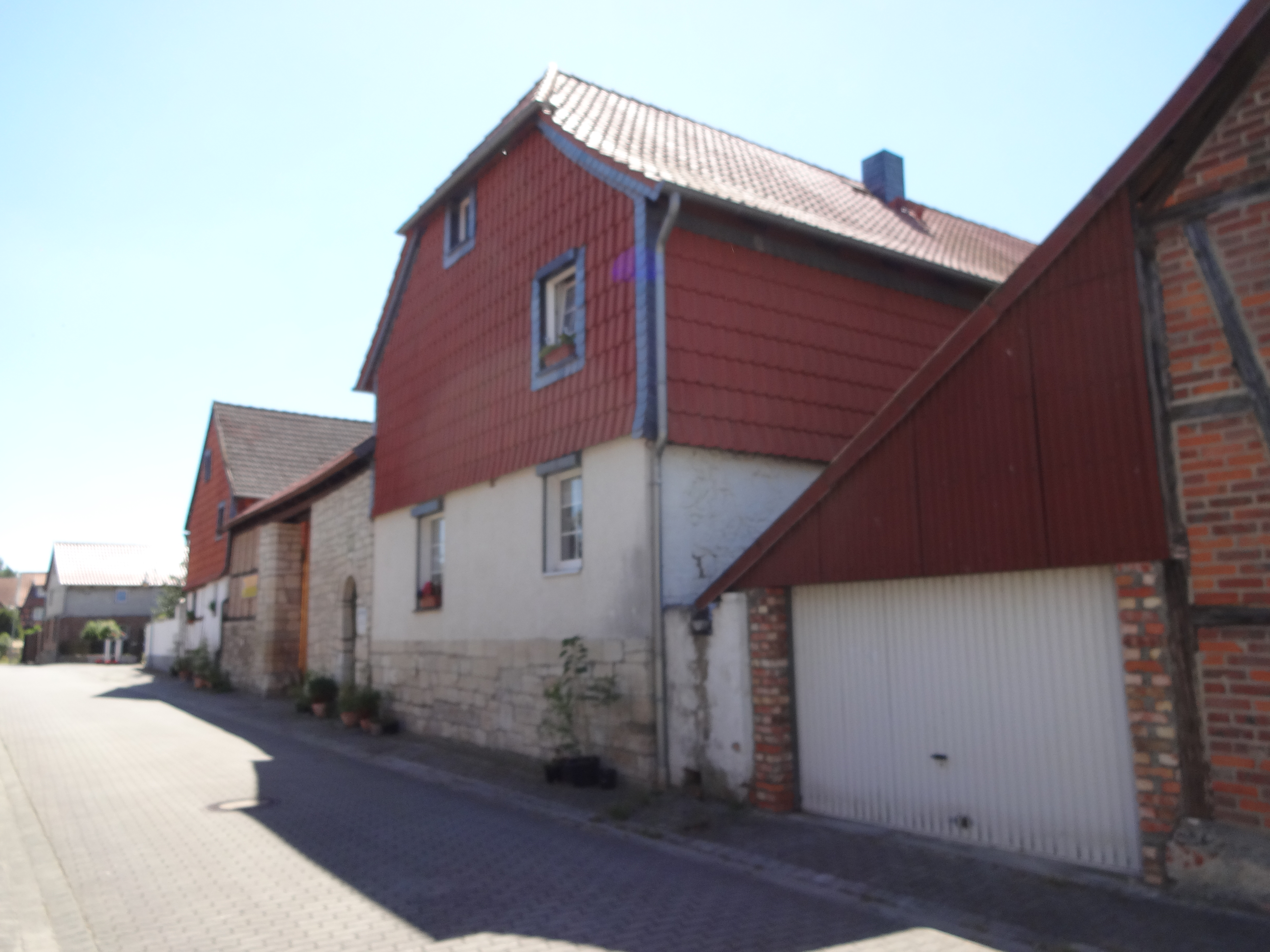 denkmalgeschütztes Bauernhaus in der Hinterstraße 4 in Dedeleben